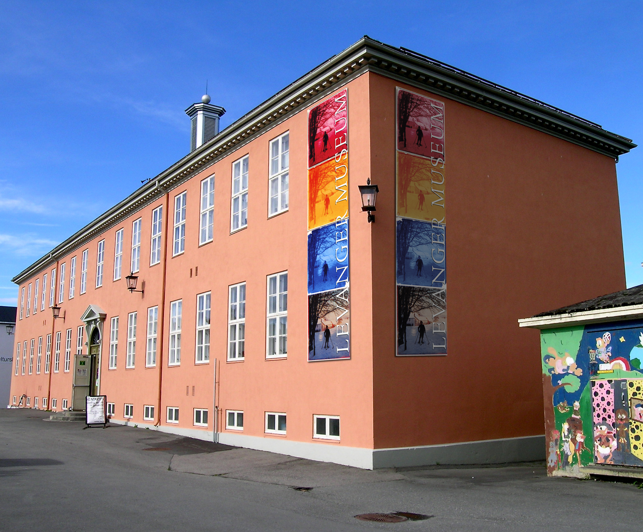 Levanger museum